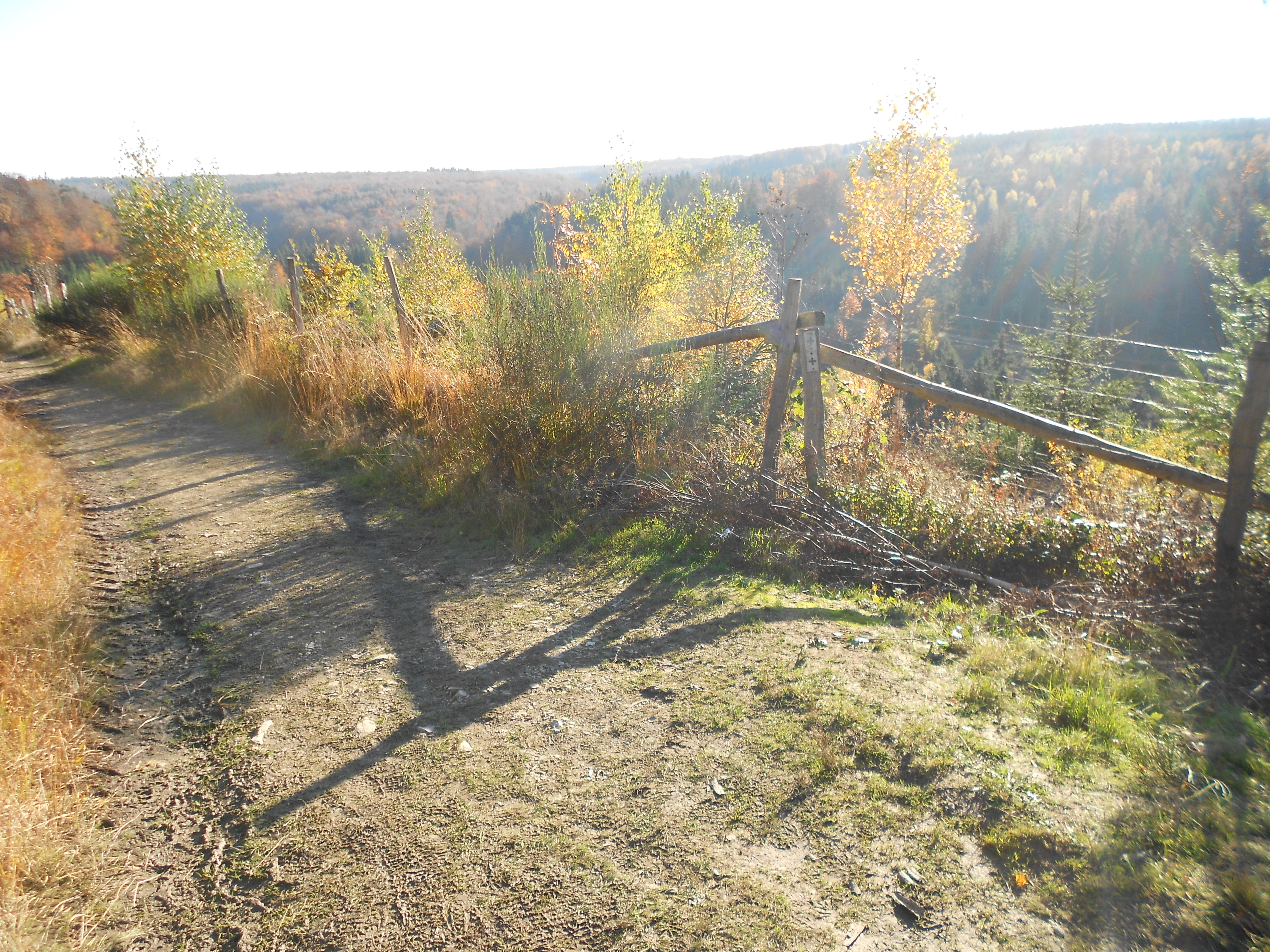 Fagnes du sud-ouest.